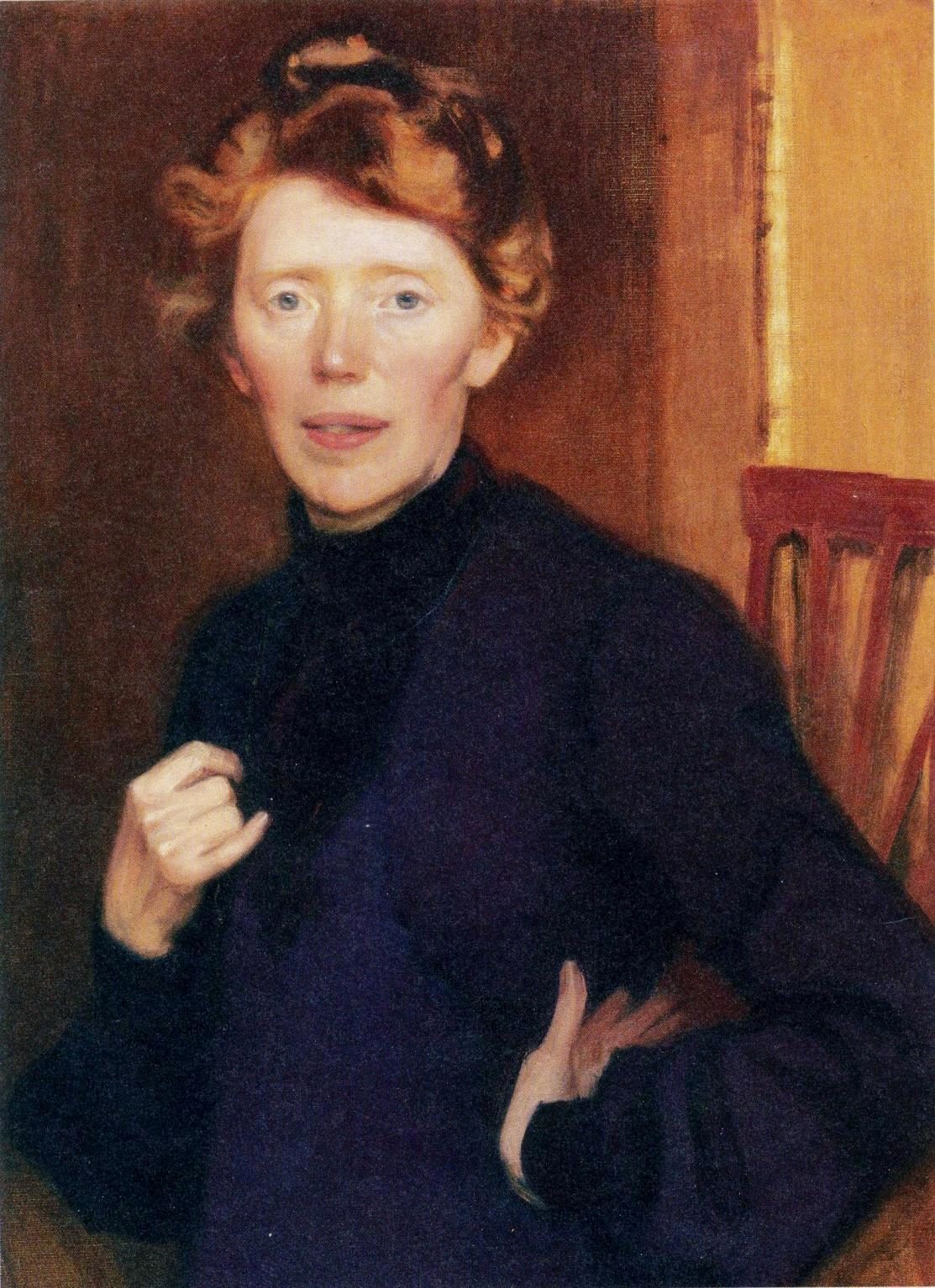 Eero Järnefeltin maalaama muotokuva toimittaja Tekla Hultinista (1864–1943). Teos on kuulunut Ateneumin taidemuseon kokoelmiin vuodesta 1906.